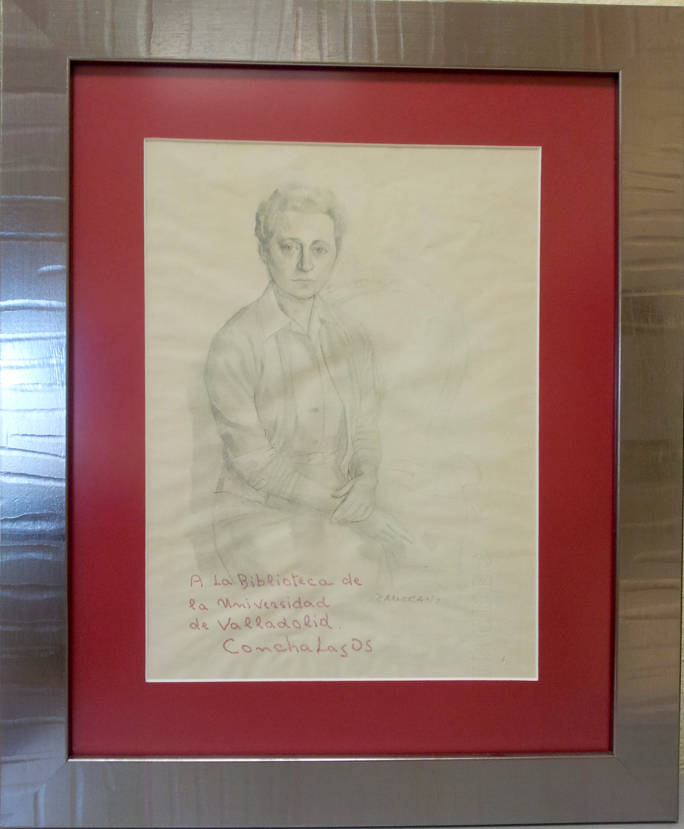 Retrato de Concha Lagos dedicado a la Biblioteca de la Universidad de Valladolid